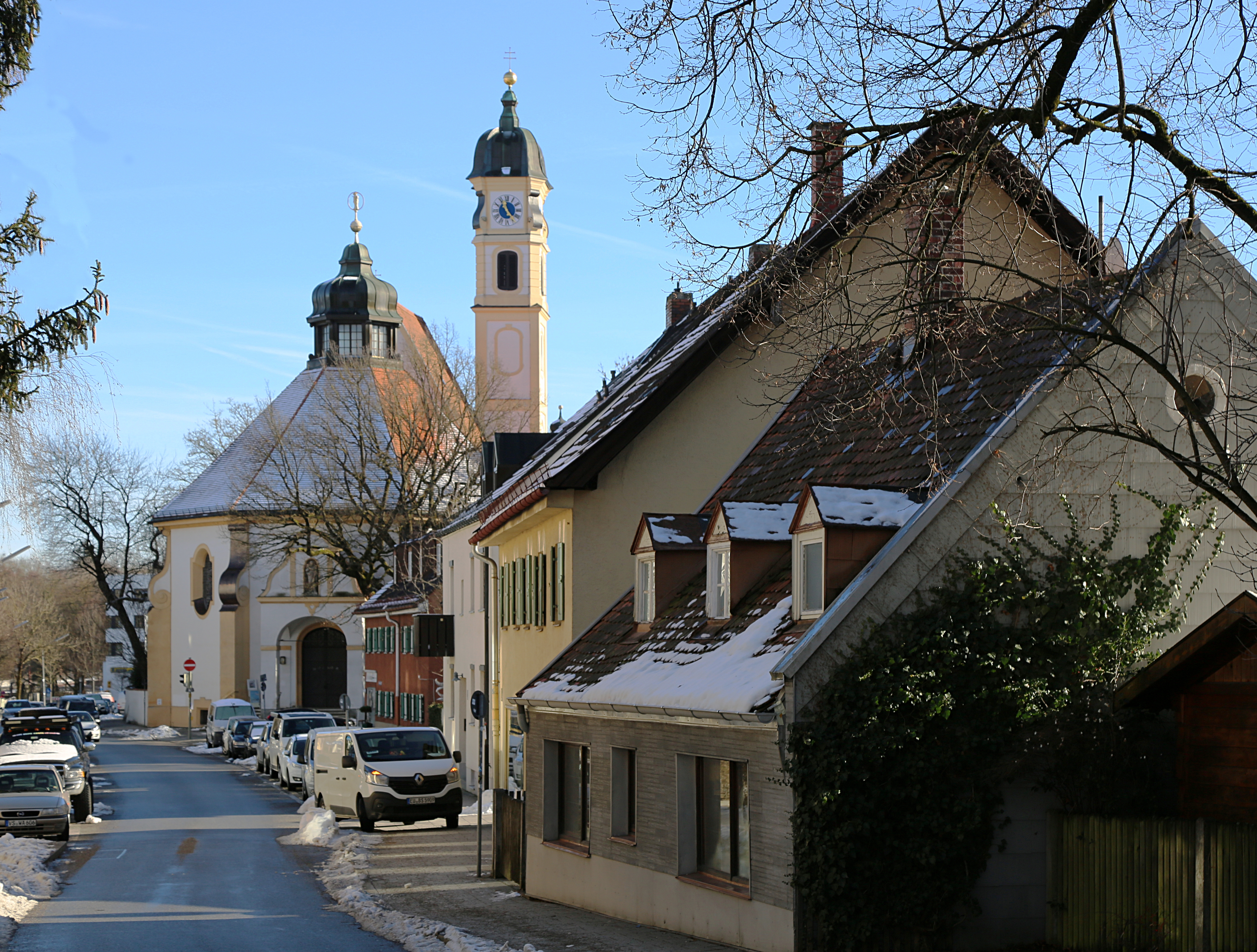 Maria Thalkirchen, Westfassade